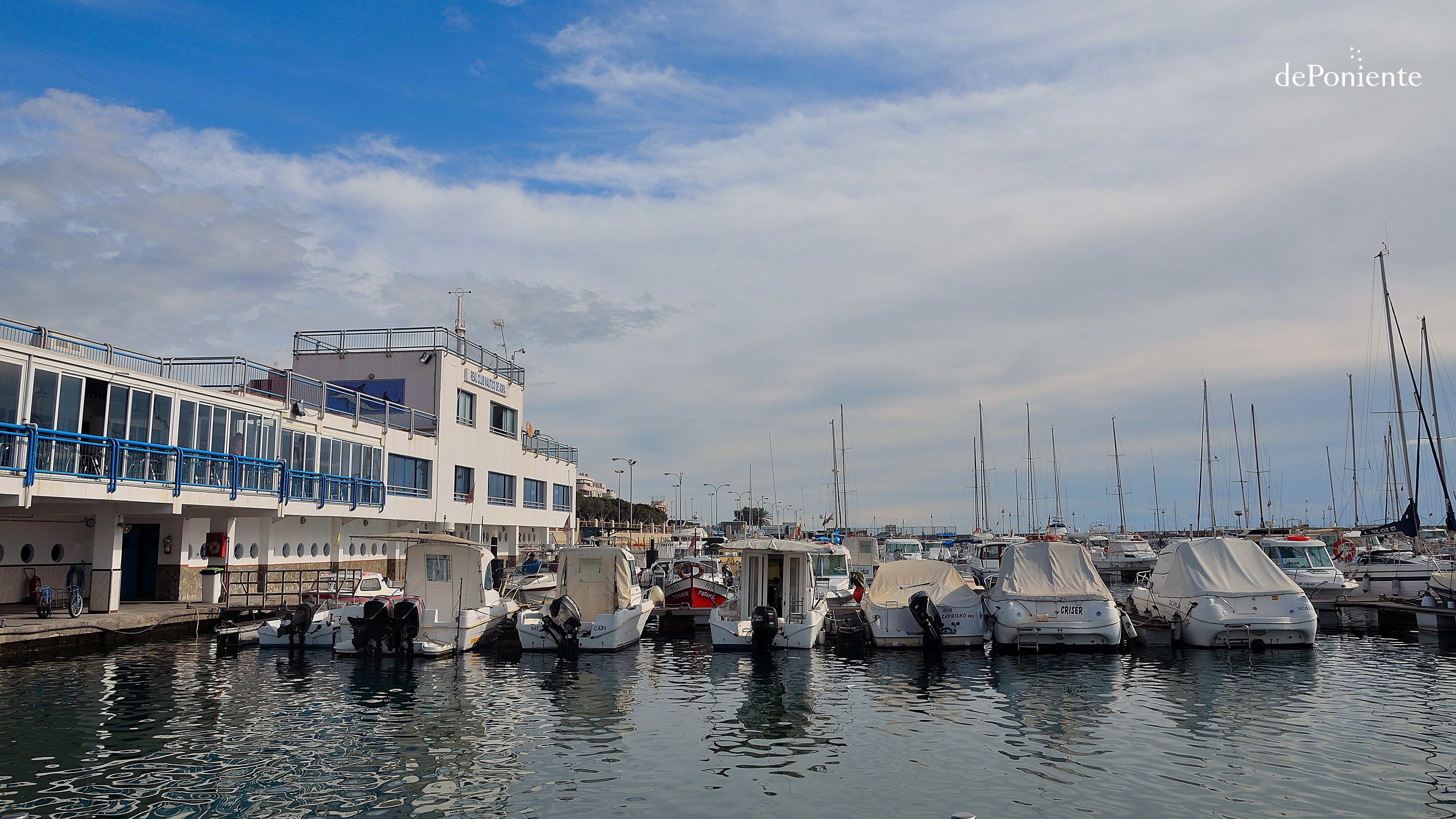 Adra